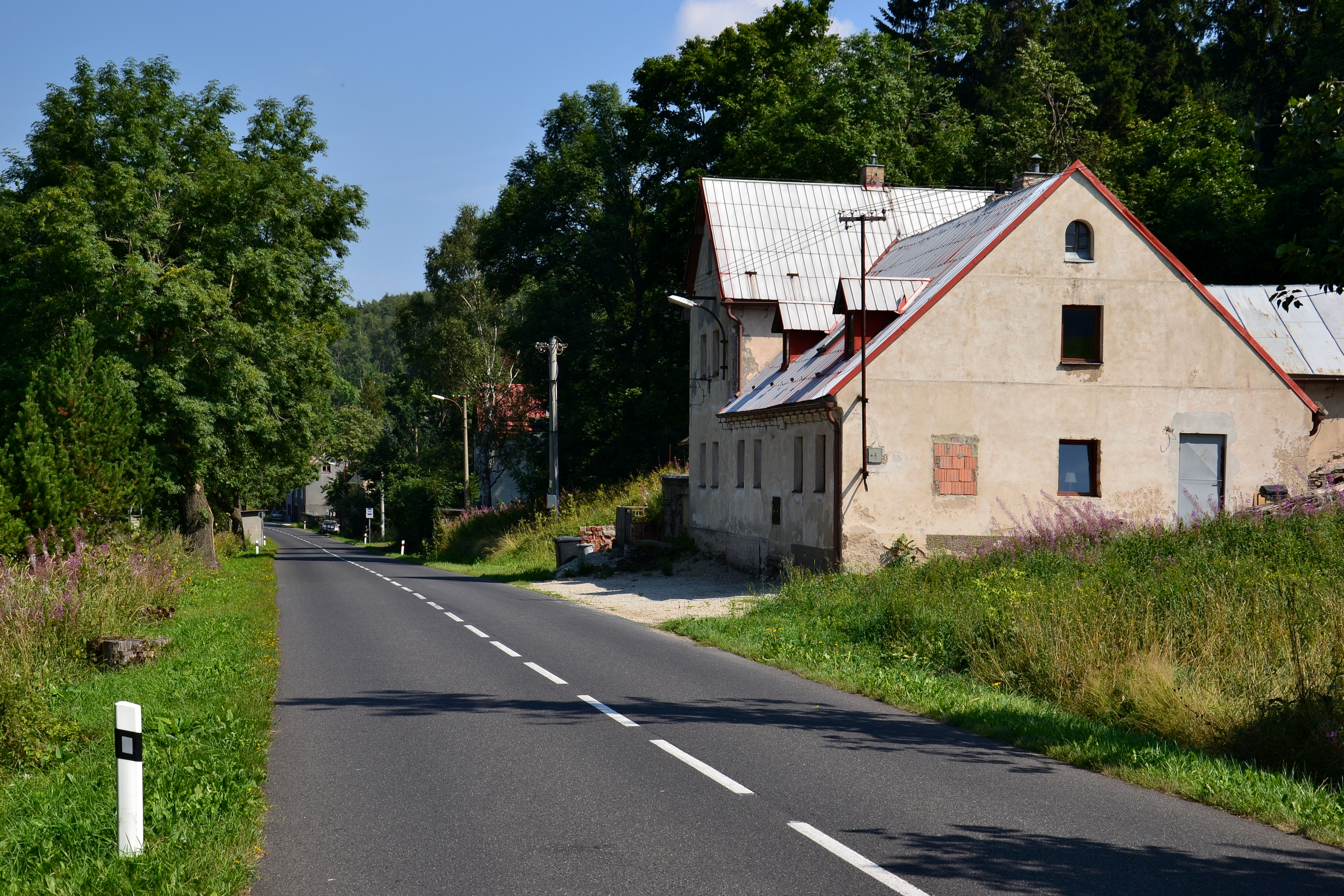 Výsada